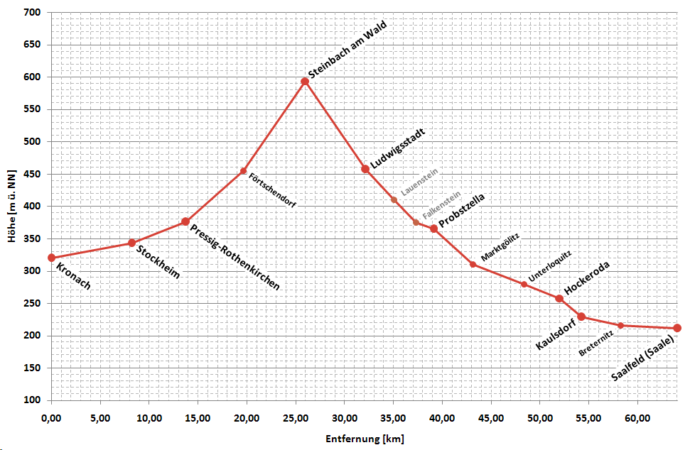 vereinfachtes Höhenprofil des Streckenabschnittes Kronach-Saalfeld (Saale) der Frankenwaldbahn